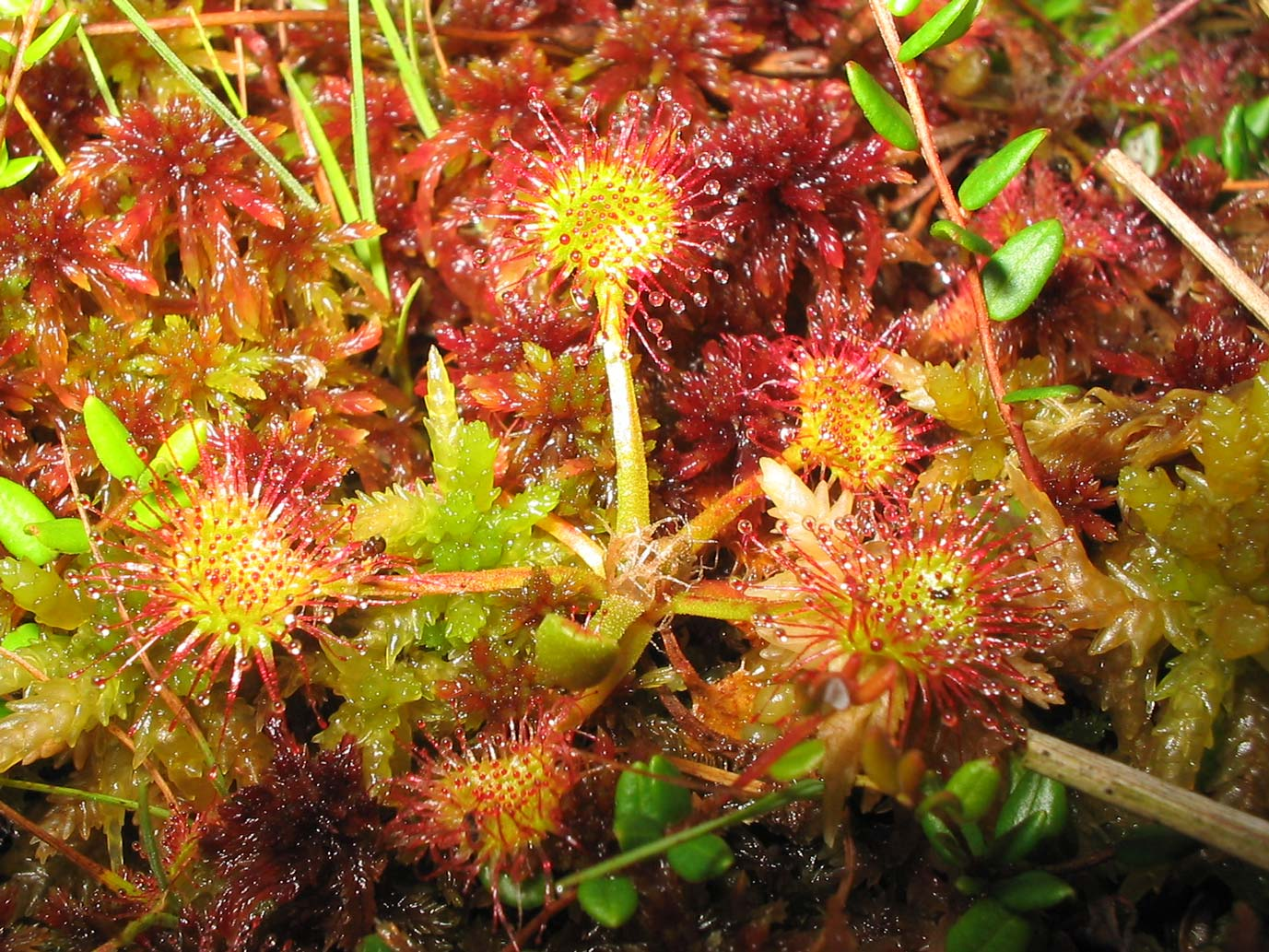 Description: Rundblättriger Sonnentau - Drosera rotundifolia (sticky) Source: selbst fotografiert Date: 30. Aug. '05 19h Photographer: Michael Gasperl (Migas) Location: AUT/Salzburg/Natwiss.Uni/Bot.Garten